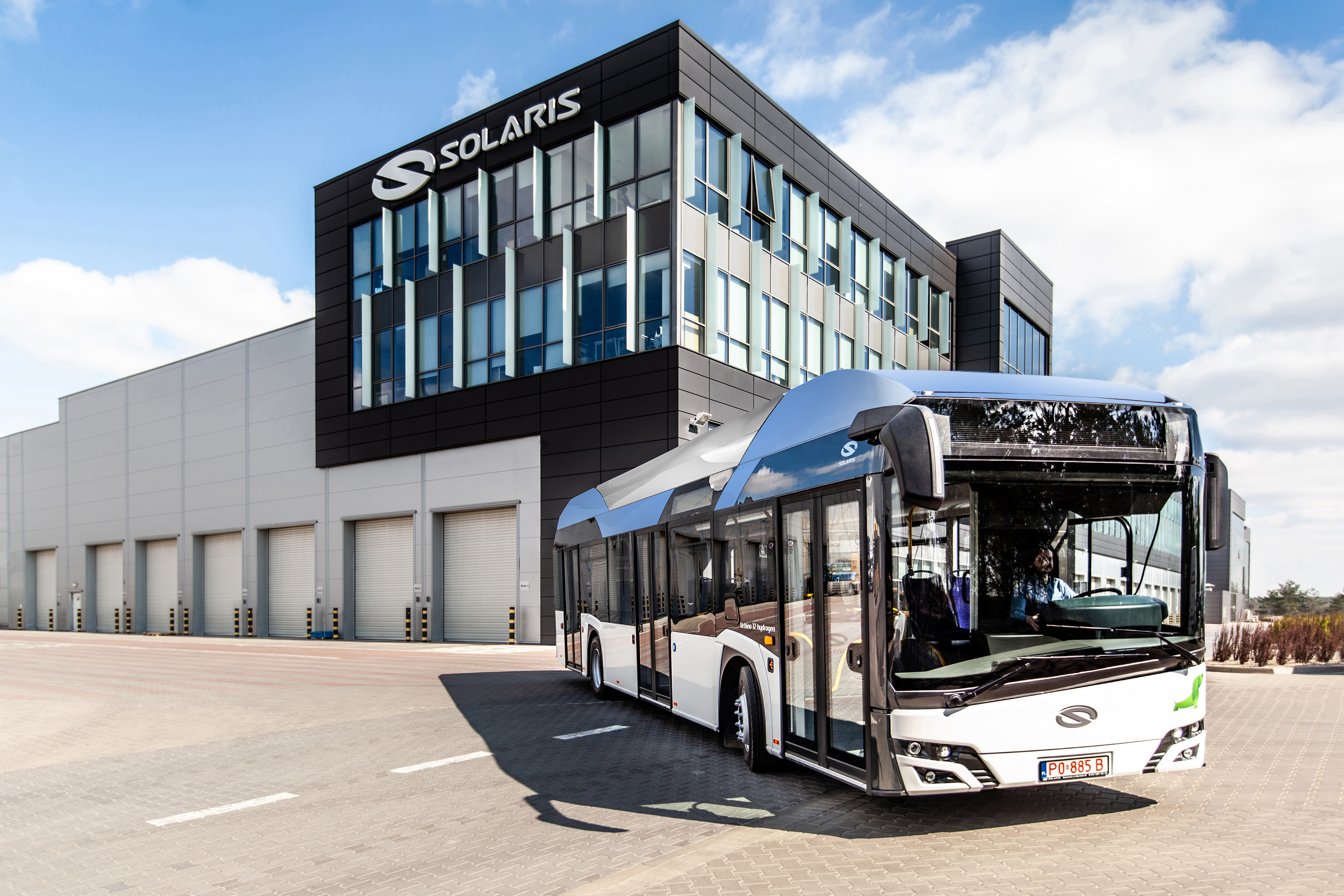 Solaris Urbino 12 hydrogen